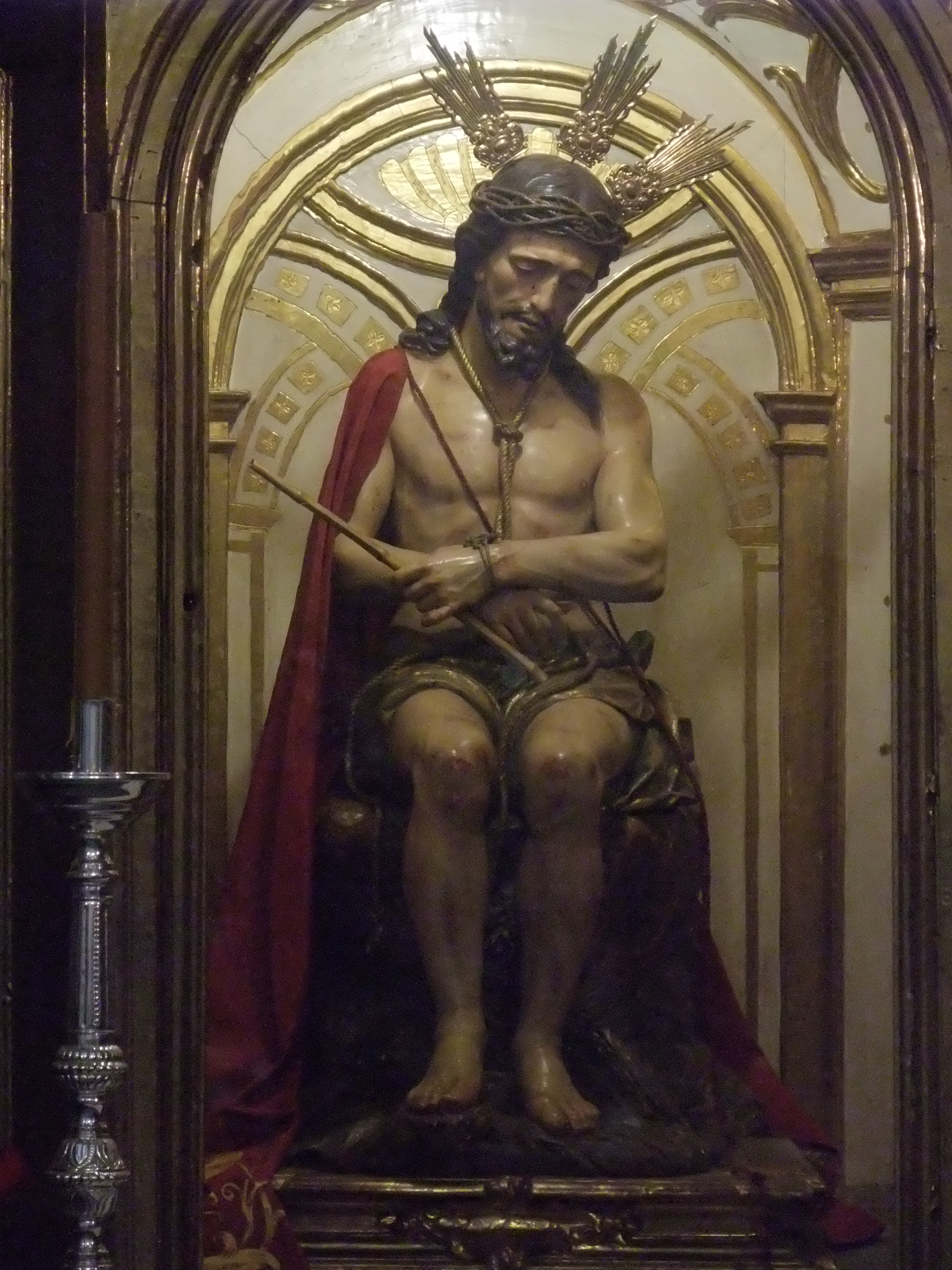 Granada-Iglesia de Santo Domingo-3-Cristo de la Humildad (Anónimo)